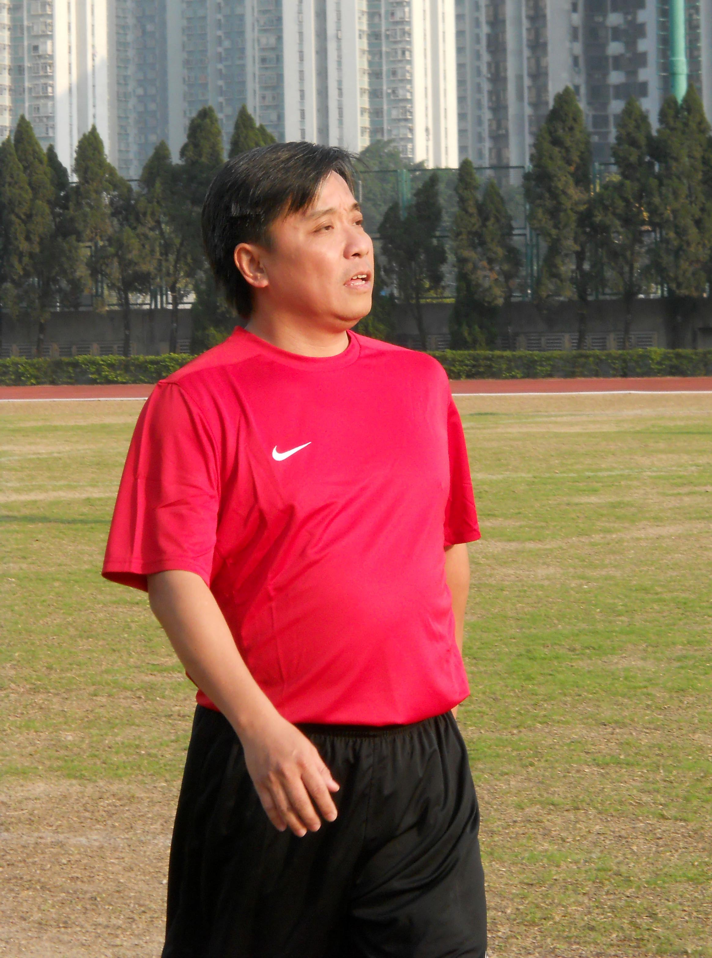 中文（香港）: 李德能